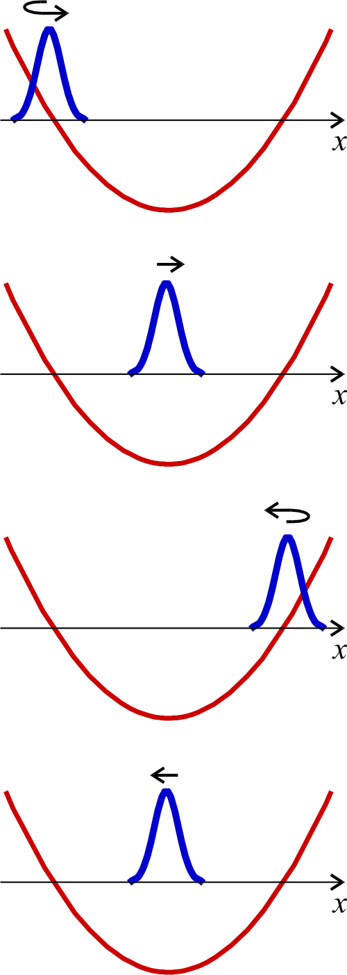 quasiklassischer Grenzfall des QM-harmonischen Oszillators